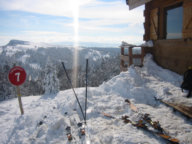 Station de ski Métabief dans le haut Doubs 2